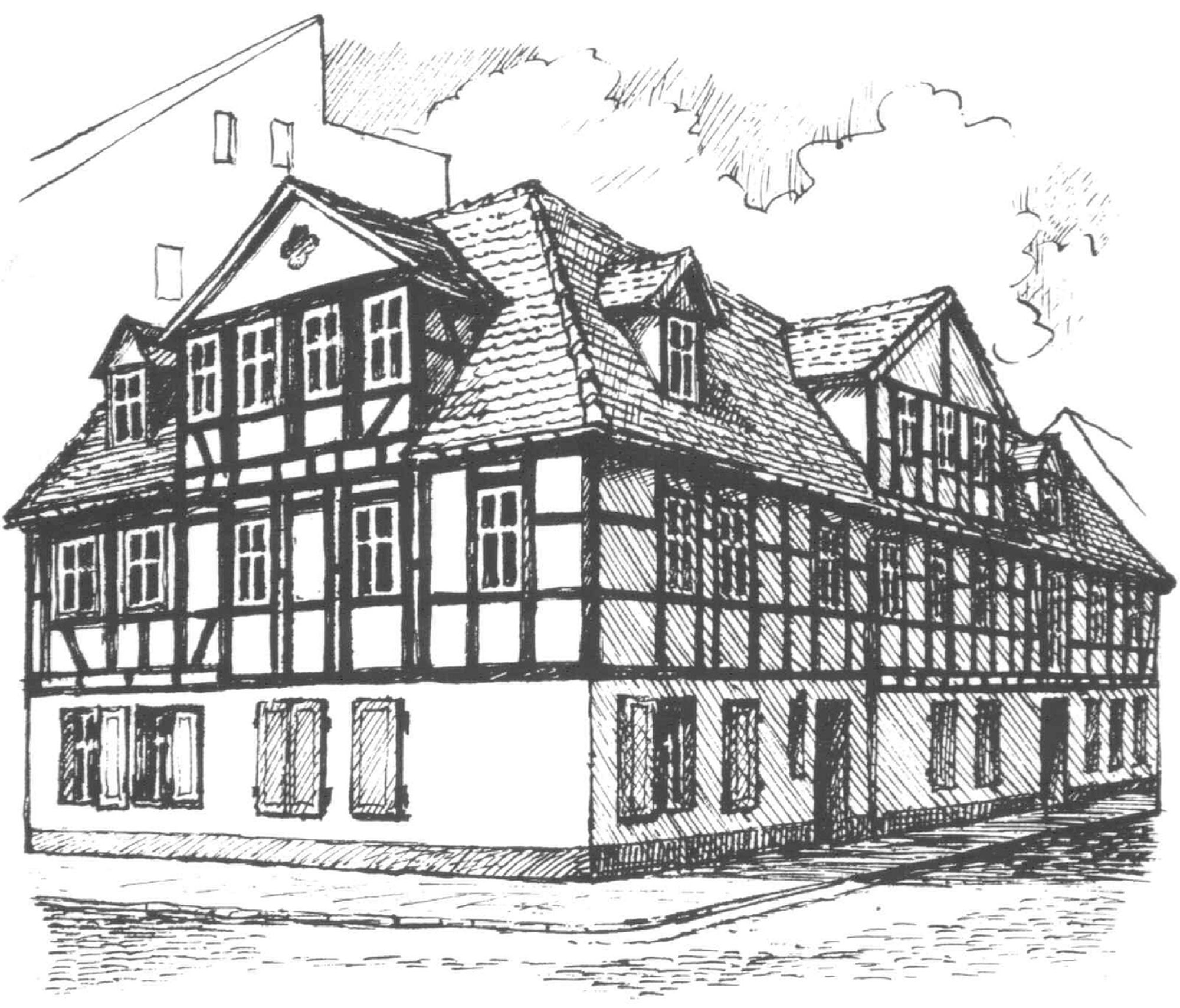 Es ist in der Pflege des Meuselwitzer Heimatvereins, in welchem ich der 2.Vorsitzende bin.